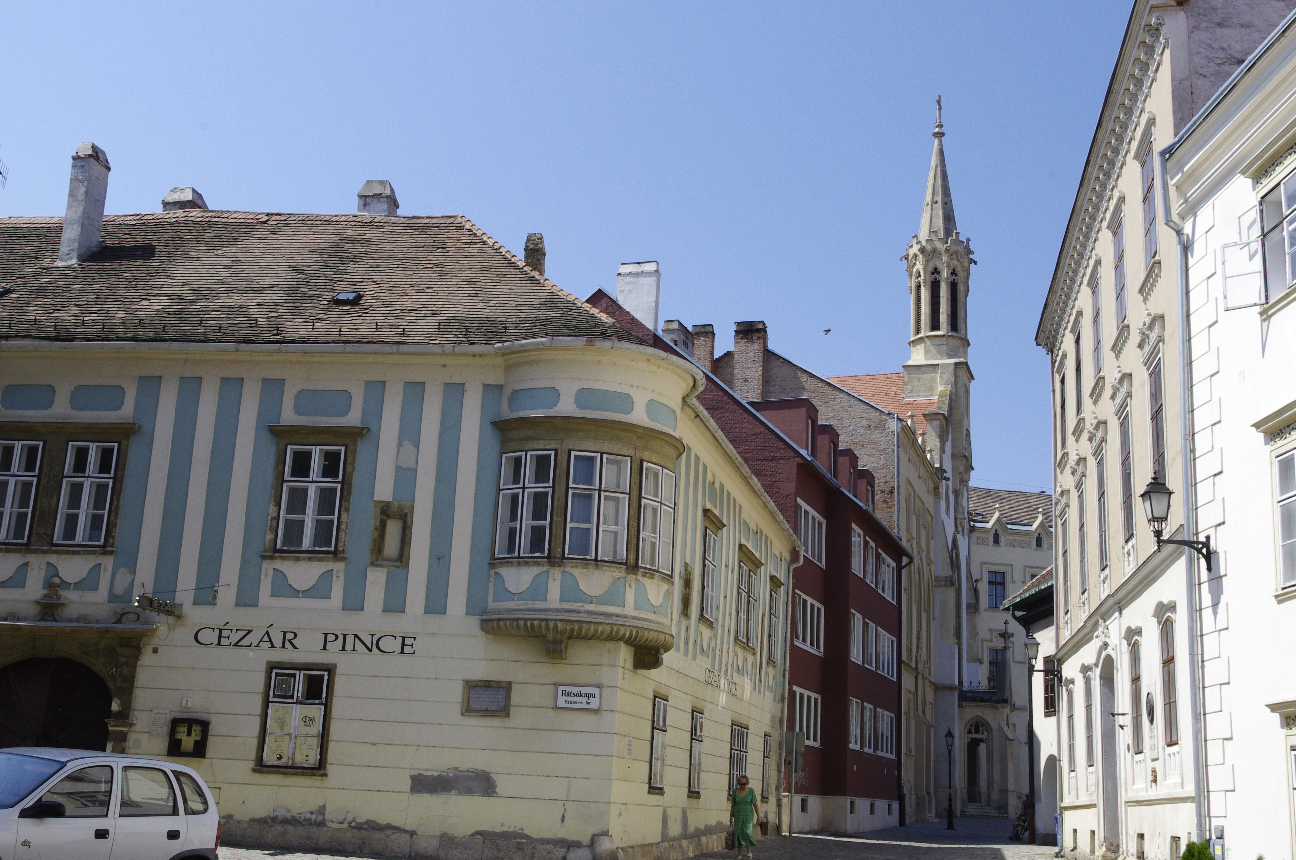 Sopron, Ungarn - Haus Cezar pince Hinteres Tor (Hatsokapu) 8 mit Blick Richtung Ursulinerplatz. Caesar House. József Horváth Soproni collection This is a photo of a monument in Hungary, Identifier: 4804